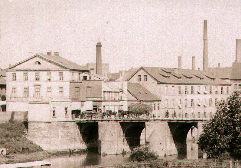 An der Stelle des heutigen Capitol-Hochhauses am Schwarzen Bären in Hannover-Linden hatte sich der königlich hannoversche Hofarchitekt Georg Ludwig Friedrich Laves seine erste eigene Villa erbaut, direkt an der Ihme-Brücke am Eingang der seinerzeit vor der Industrialisierung als Villen-Vorort geplanten, späteren Industriestadt Linden. Nach dem Bau der - heutigen - Laveshauses wurde die erste Villa ab ca. 1833 von der Lederfabrik August Söhlmann genutzt und war Schauplatz der Aufstellung der ersten Dampfmaschine im Königreich Hannover - noch vor Georg Egestorff. Die Villa diente später auch als "Photographisches Atelier" verschiedener Fotografen. Hier im Bild ist eine der älteren Vorläuferinnen der heutigen Benno-Ohnesorg-Brücke zu sehen, im Hintergrund die Schornsteine der Mechanischen Weberei ...